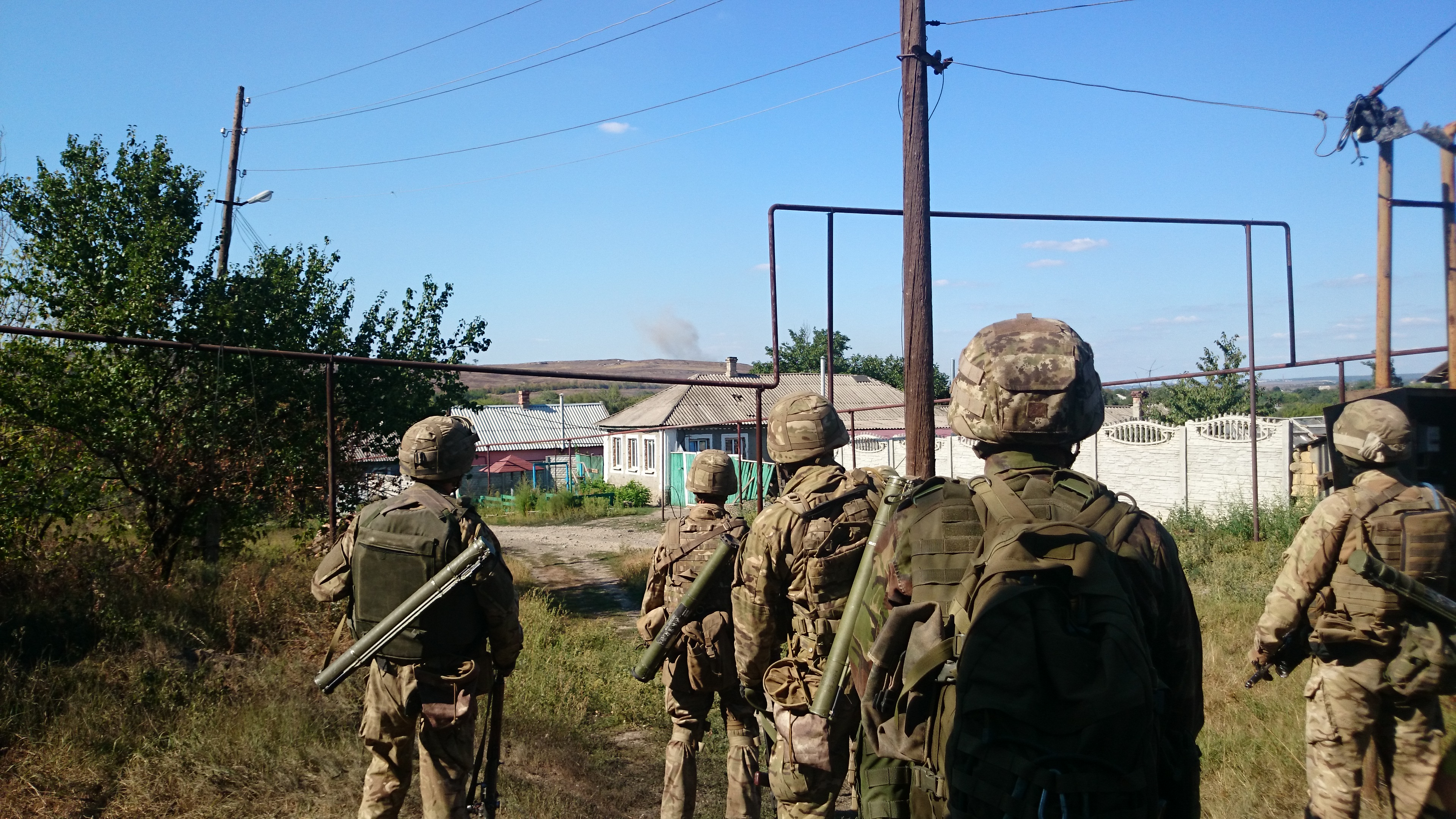 Група 8-го ОПСпП заходить в населений пункт на Донбасі під час війни на сході України 2014 року.